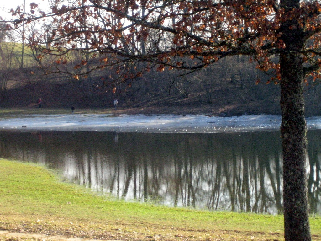 Eichener See